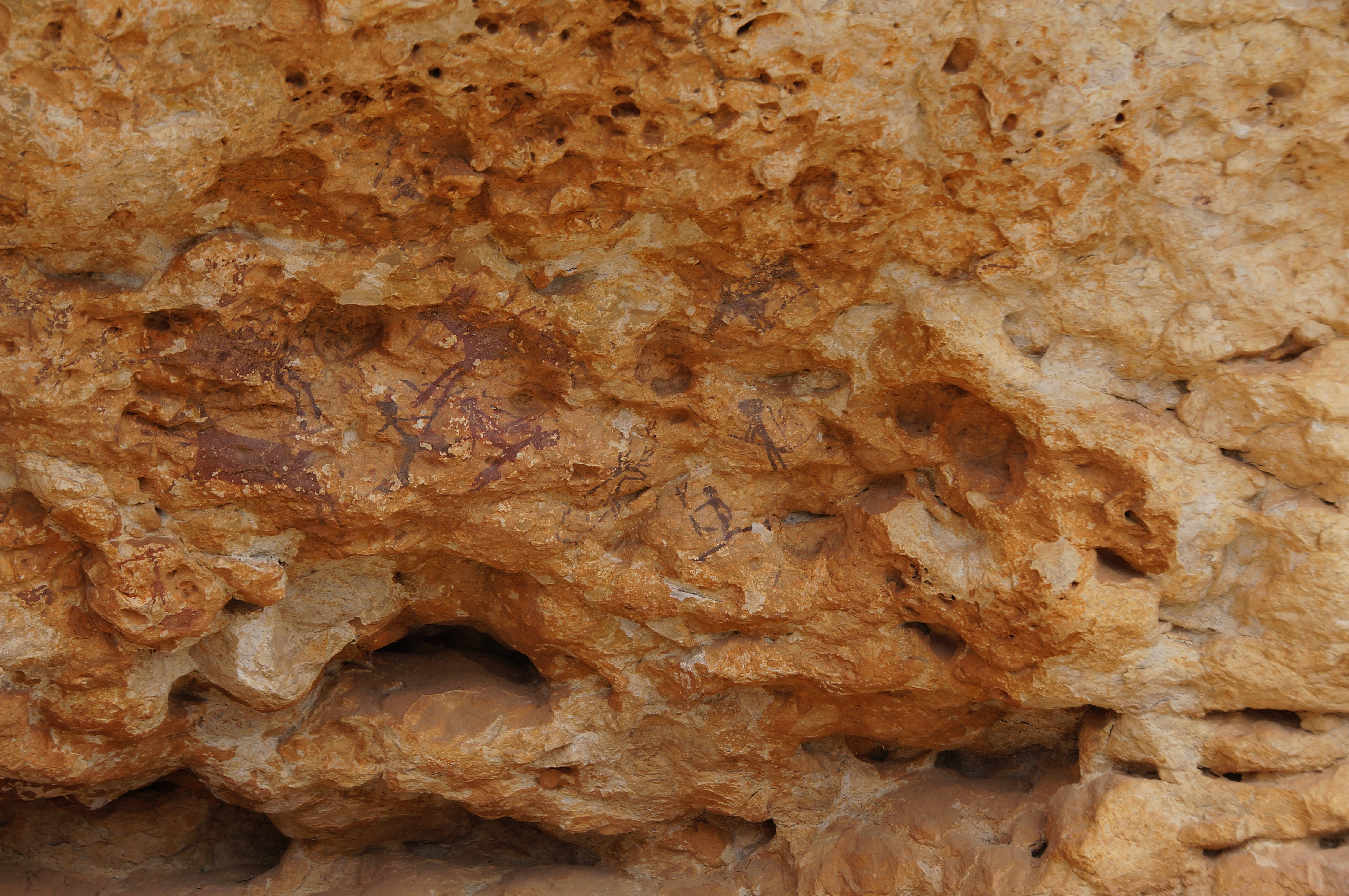 Abrics d'Ermites I (Ulldecona)